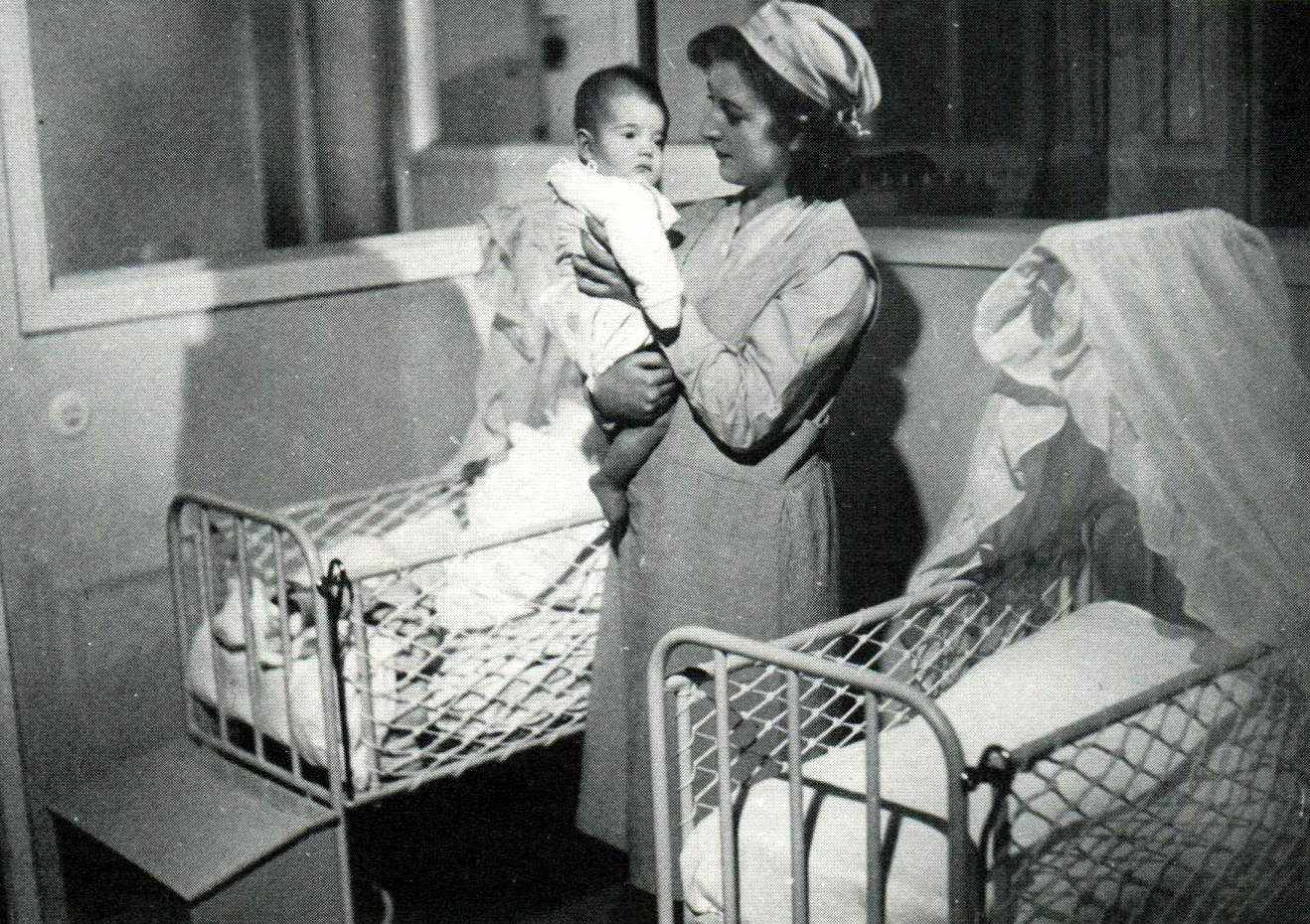 Nasce una famiglia - documentario di Francesco Pasinetti - 1943